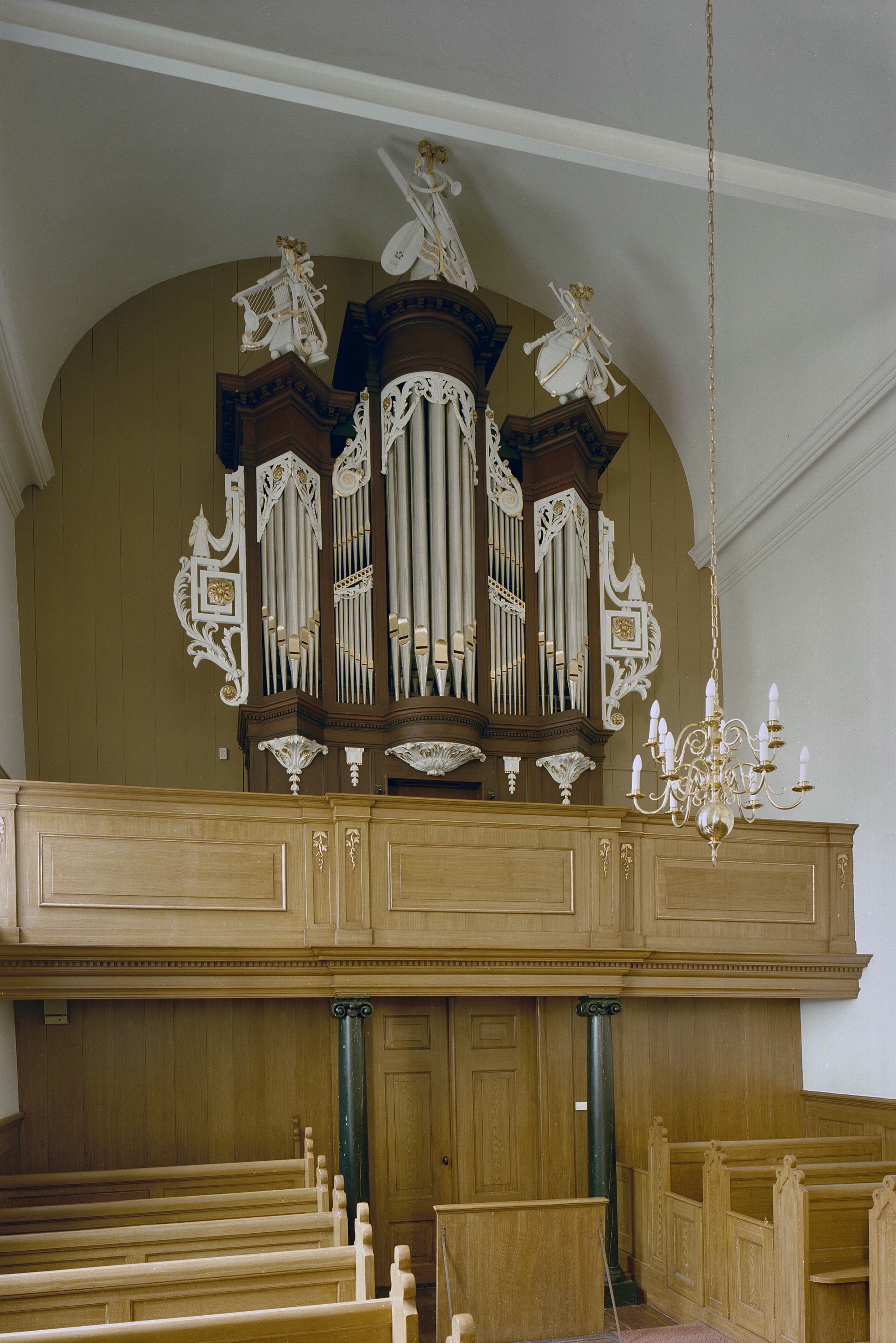 Nederlands Hervormde Kerk: Interieur, aanzicht orgel, orgelnummer 679 (opmerking: Gefotografeerd voor Het Historische Orgel in Nederland 1790-1818, bladzijder 101)